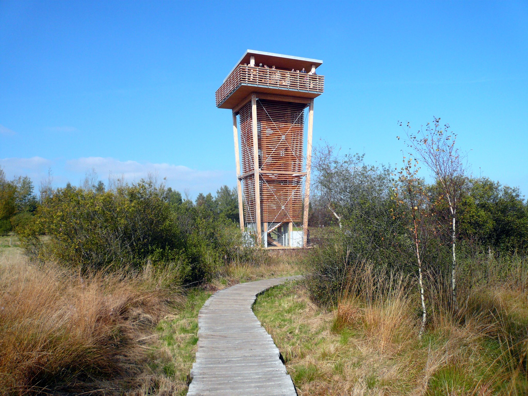 Schwarzes Moor, 2007 erbauter Aussichtsturm